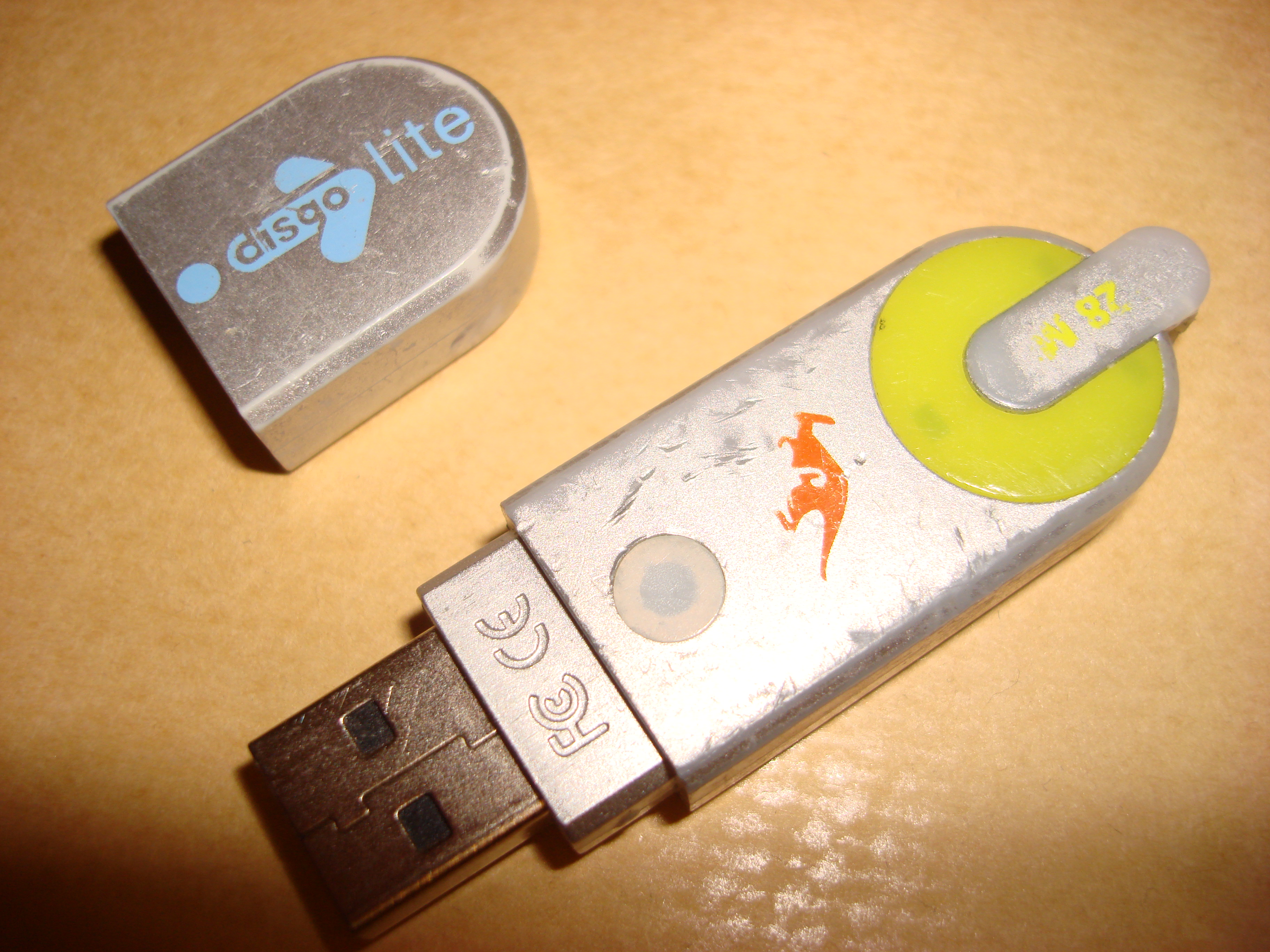 Disgo Lite USB flash drive 28mb